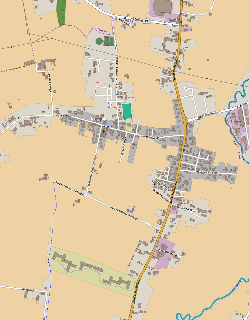 Mappa frazione Polegge